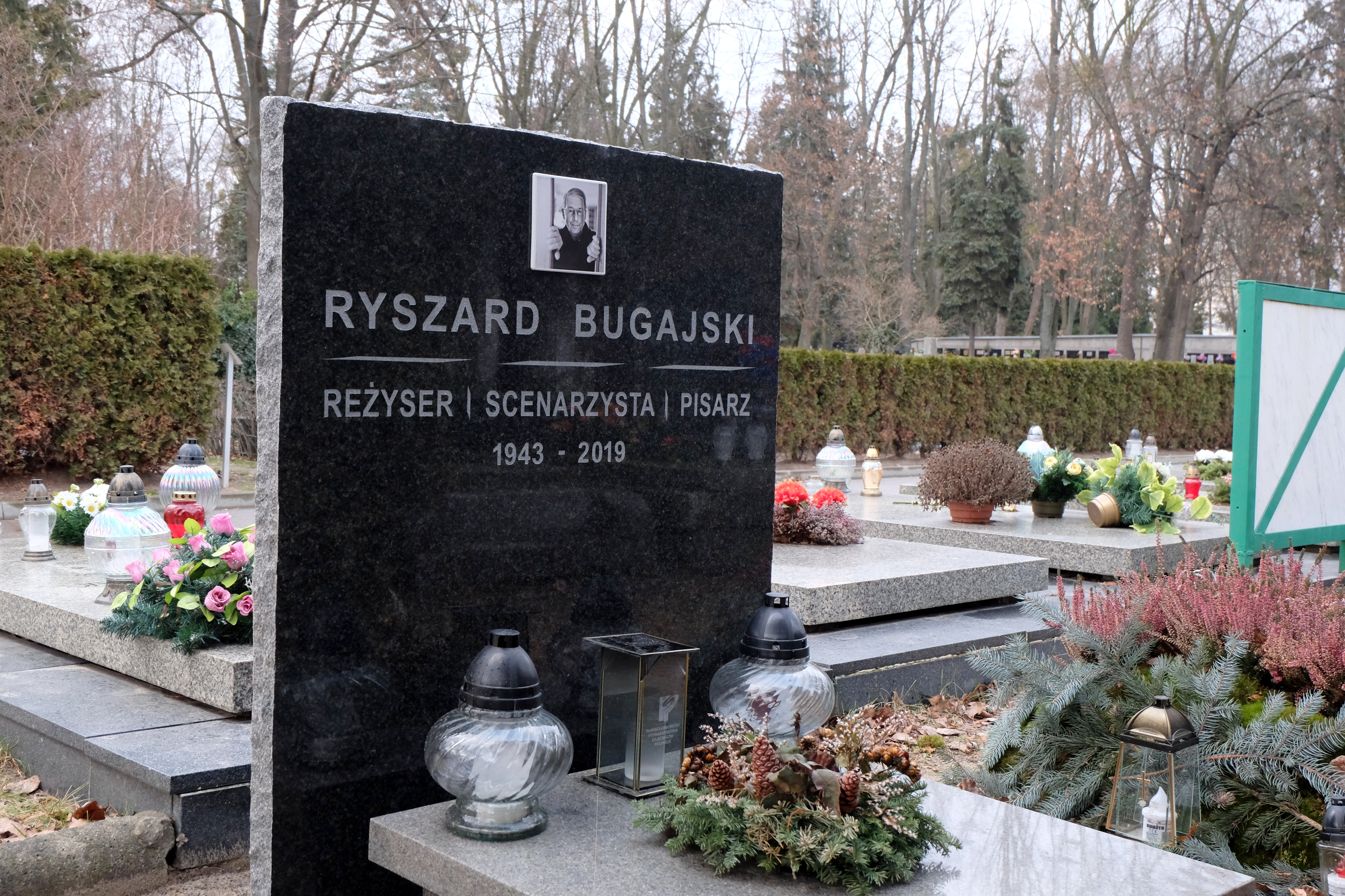 Grób reżysera Ryszarda Bugajskiego na Cmentarzu Wojskowym na Powązkach w Warszawie